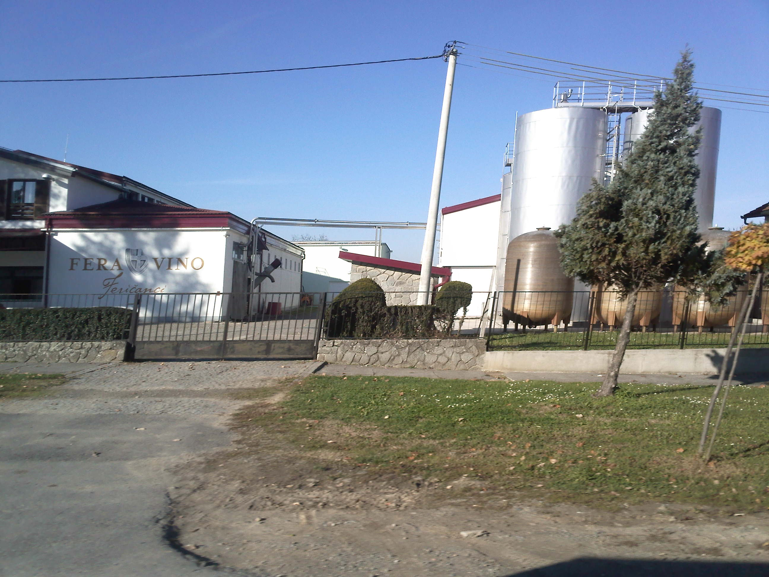 Vinarija Fera vino